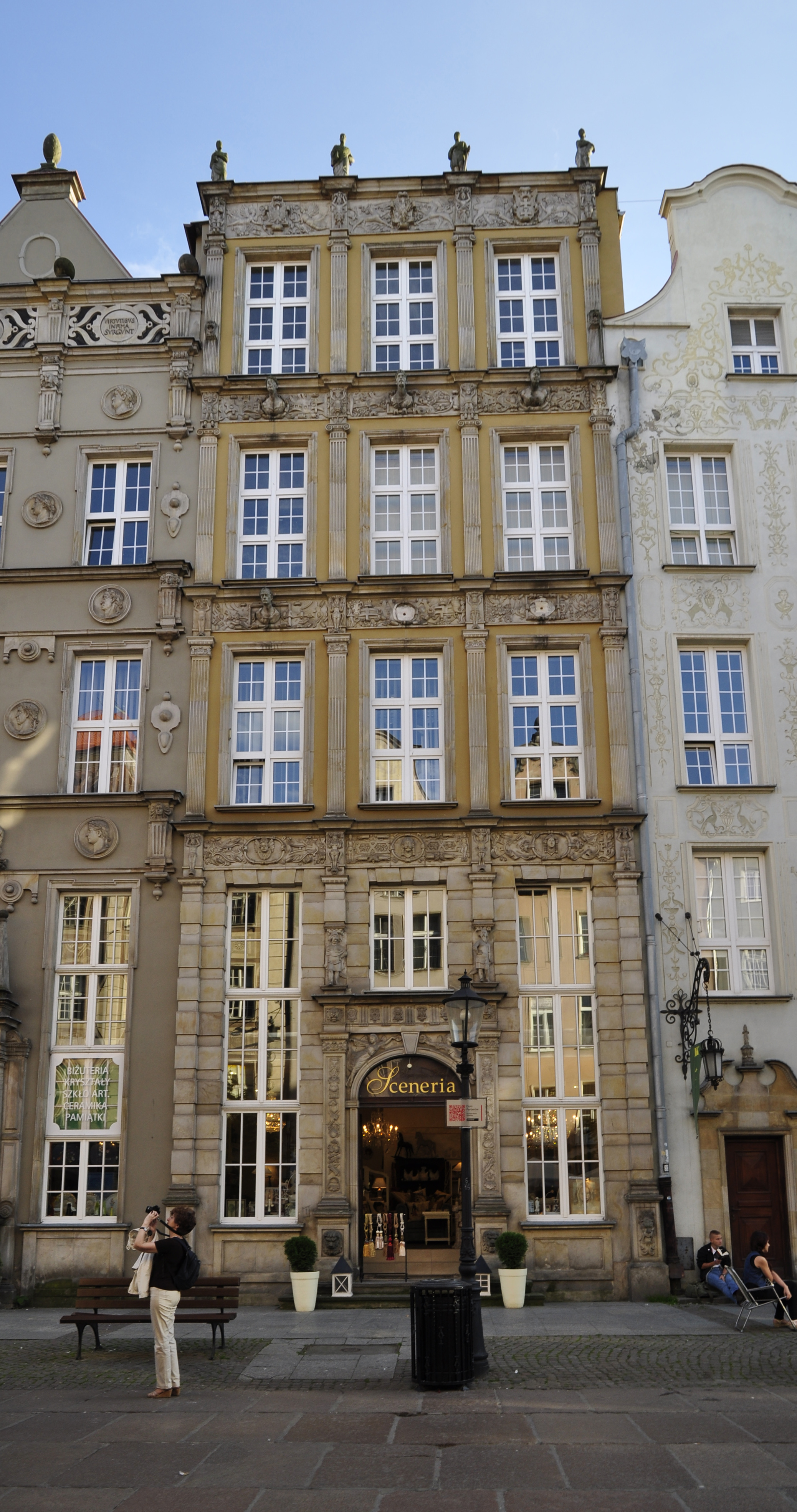 dom "Kamienica Ferberów" Gdańsk, ul. Długa 28